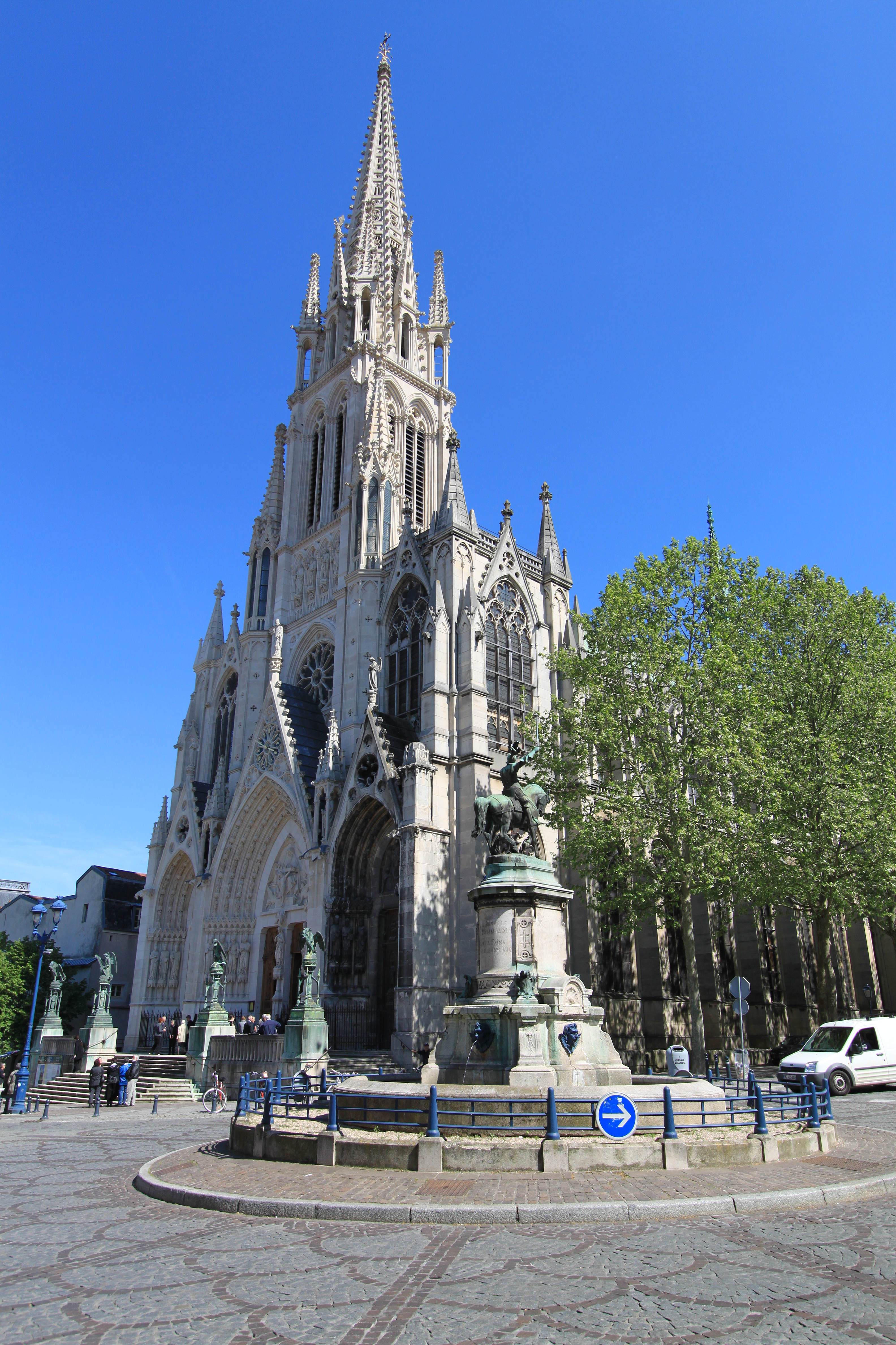 Basilique Saint-Epvre de Nancy et place Saint-Epvre